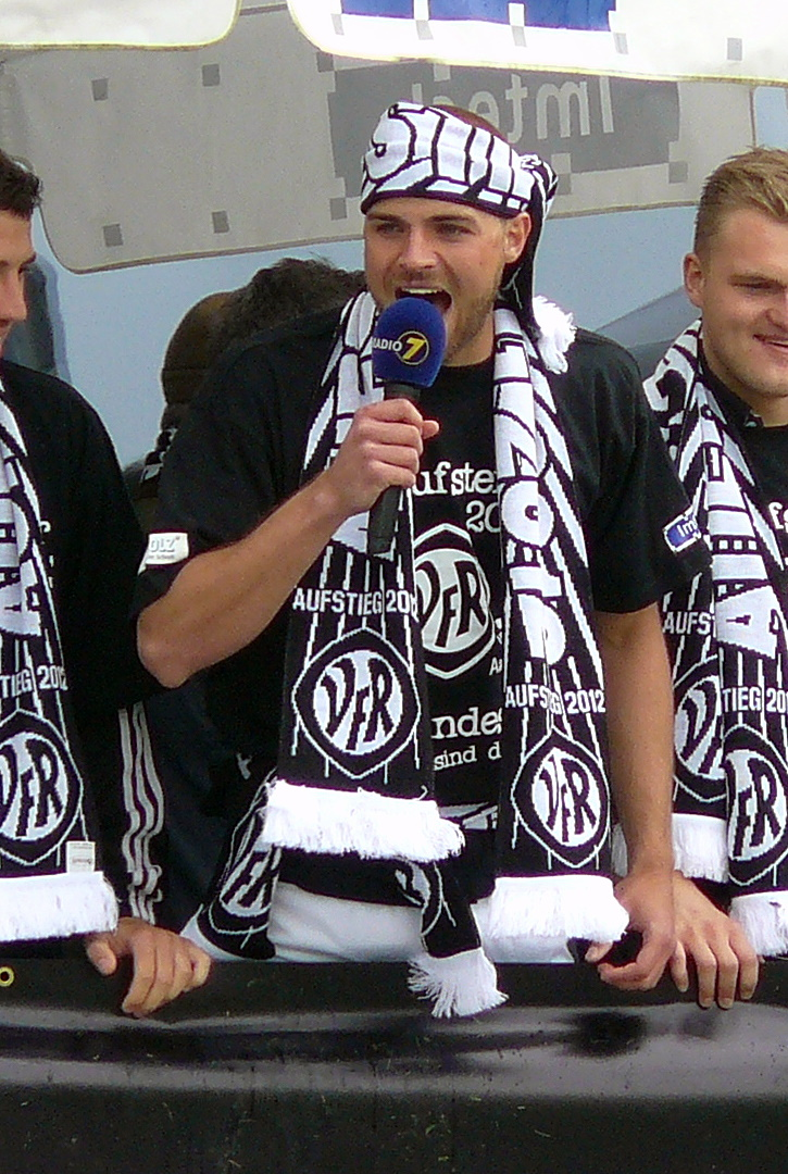 Sascha Herröder bei der Aufstiegsfeier des VfR Aalen am 5. Mai 2012